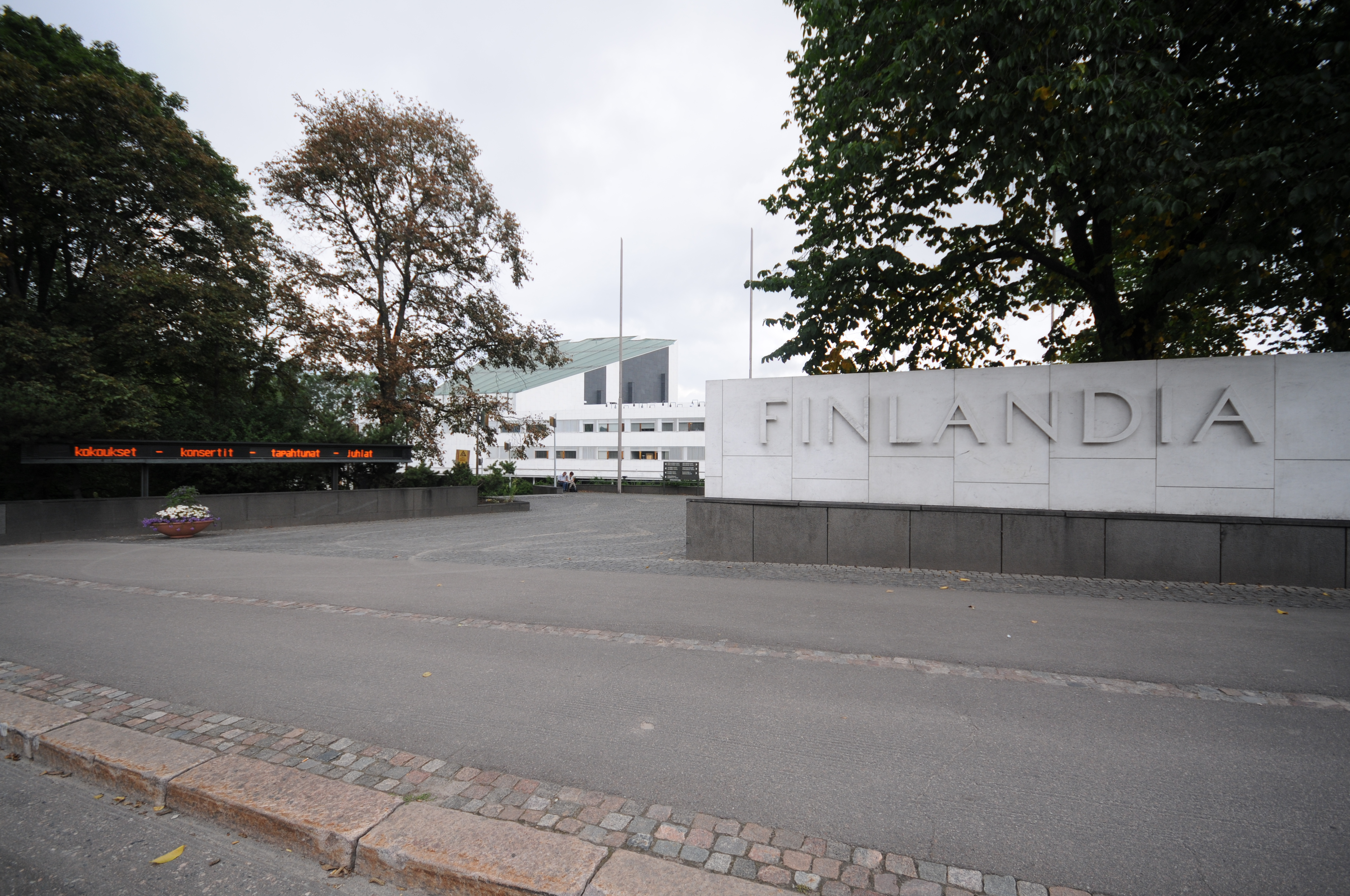 Helsinki